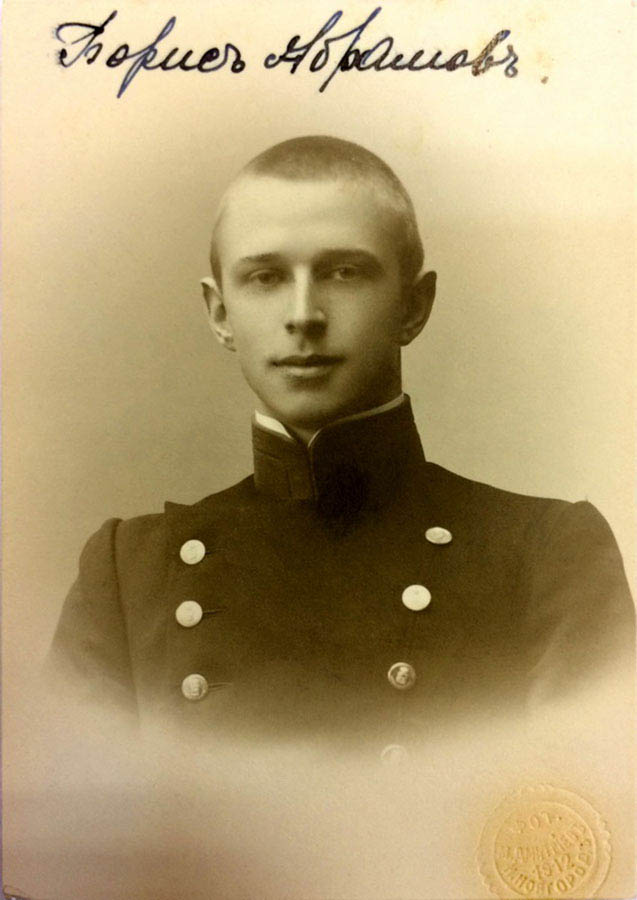 Б. Н. Абрамов – студент. 1915 г.